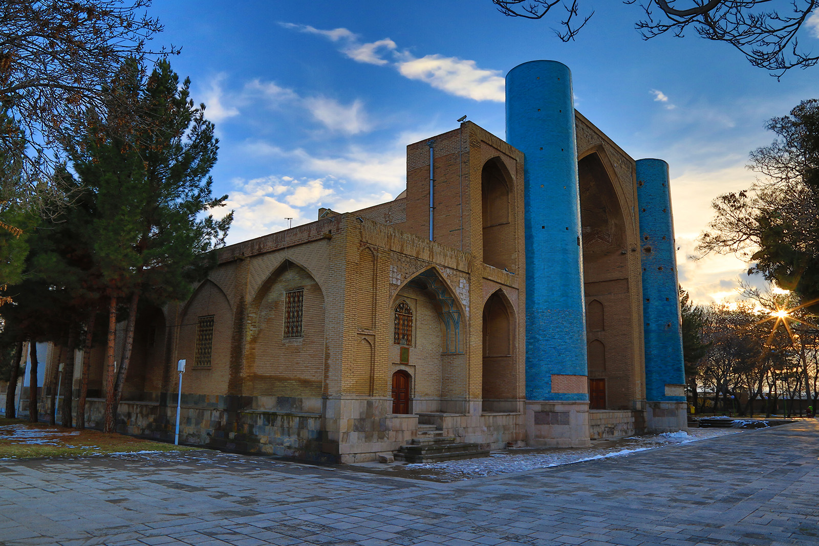 مقبره شیخ شهاب‌الدین اهری - عارف قرن هفتم - فیروزه قره داغ - بقعه شیخ شهاب الدین - شیخ شهاب الدین اهری